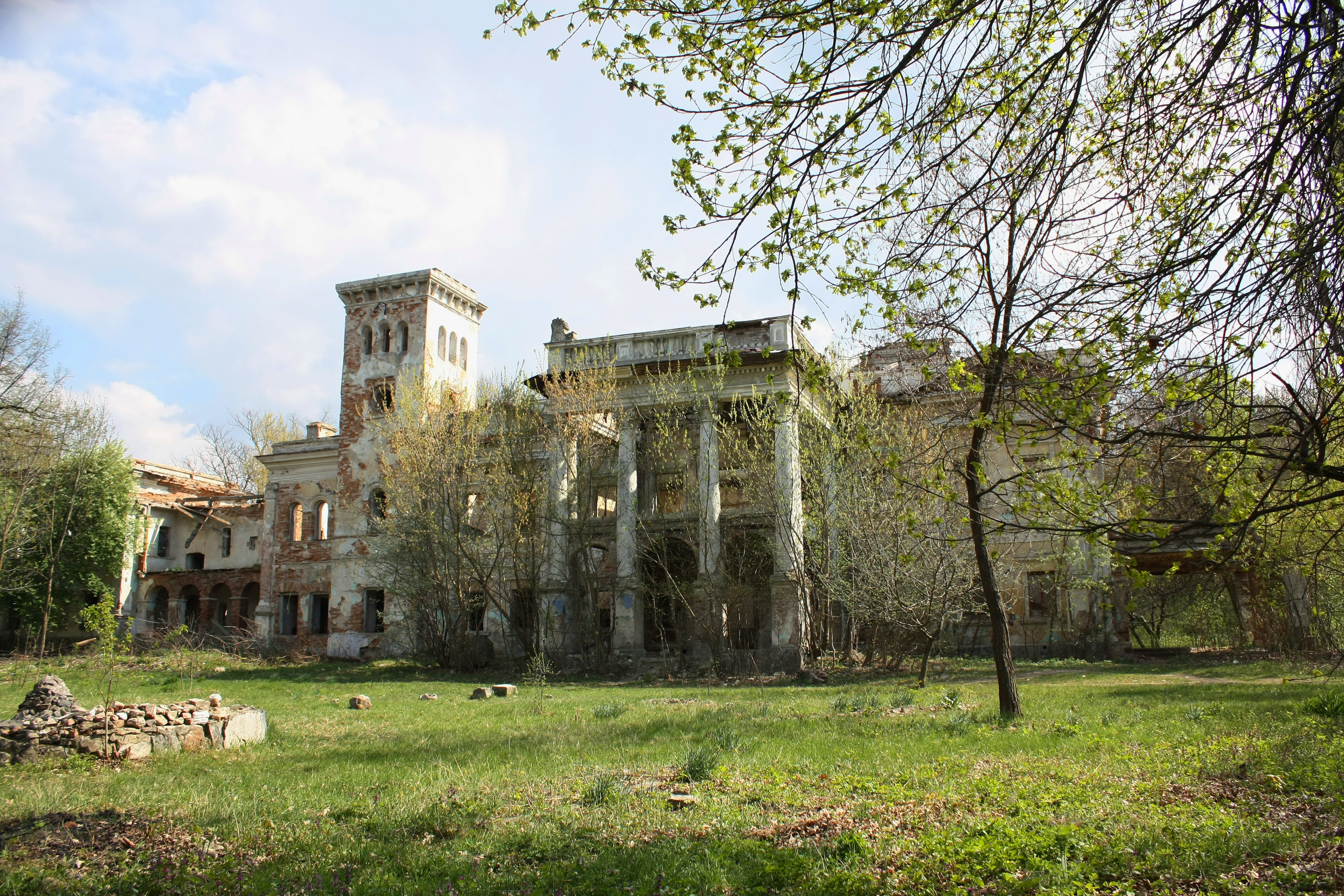 Ободівський парк, Тростянецький район, Ободівська сільська рада